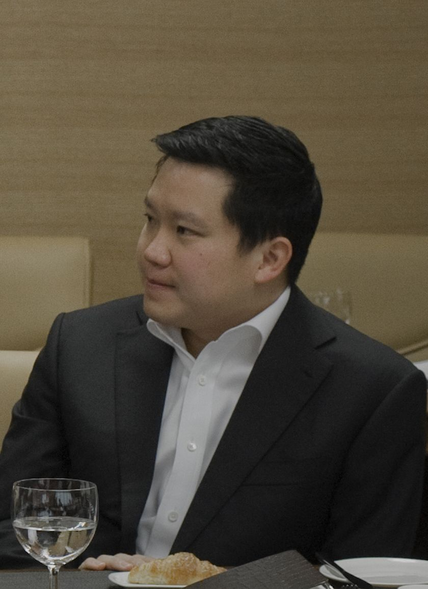 ฐาปน สิริวัฒนภักดี บมจ.โออิชิ / ไทยเบฟเวอเรจ นายกรัฐมนตรี เป็นประธานการประชุมผู้บริหารระดับสูงของภาคเอกชนพบนายกรัฐมนตรี พร้อมร่วมรับประทานอาหารกลางวัน ณ อาคารจามจุรีสแควร์ เขตปทุมวัน กรุงเทพฯ วันเสาร์ที่ 26 กุมภาพันธ์ พ.ศ.2554 (Photographer attached to the Prime Minister of the Kingdom of Thailand (H.E.Mr.Abhisit Vejjajiva) : Peerapat Wimolrungkarat / พีรพัฒน์ วิมลรังครัตน์) @is50mm